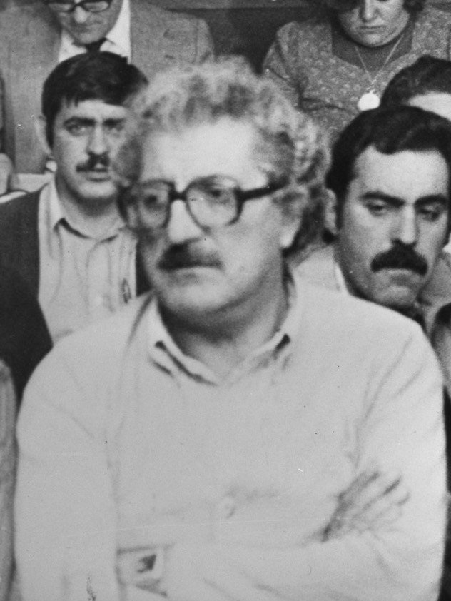 Collectie / Archief : Fotocollectie Anefo Reportage / Serie : [ onbekend ] Beschrijving : Spaanse verkiezingen; Santiago Carrillo (PCE) presenteert kandidaten voor zijn partij links Ramon Tamames en Christina Almeida , rechts Pilar Brabo Datum : 13 juni 1977 Locatie : Spanje Trefwoorden : kandidaten, politieke partijen, verkiezingen Fotograaf : [onbekend] Auteursrechthebbende : Nationaal Archief Materiaalsoort : Negatief (zwart/wit) Nummer archiefinventaris : bekijk toegang 2.24.01.04 Bestanddeelnummer : 929-2263